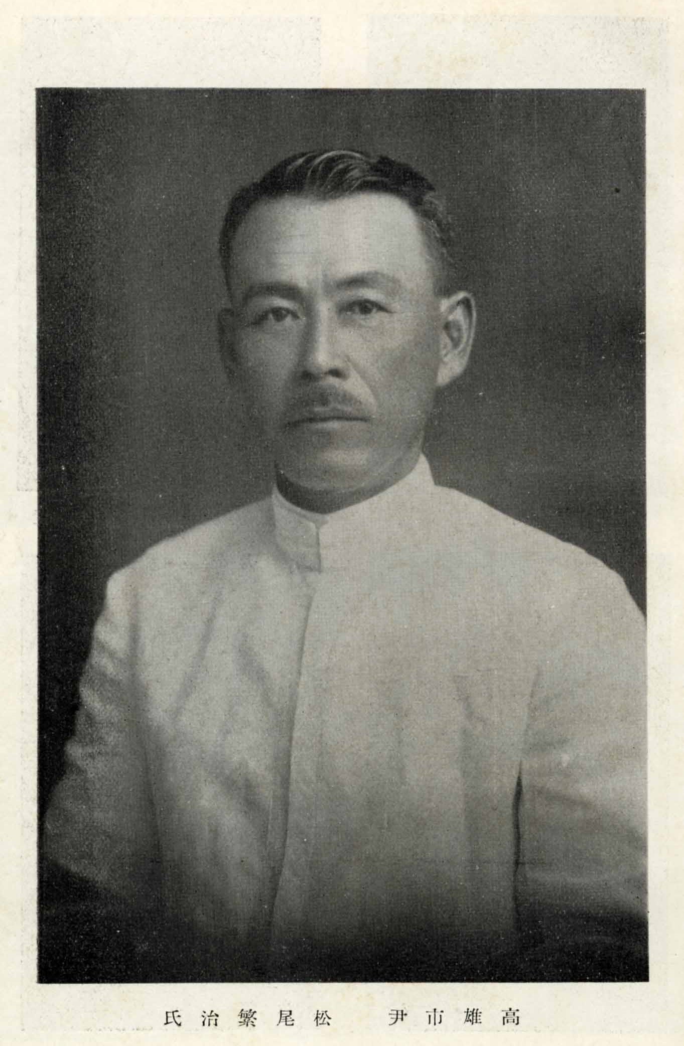 Shigeharu Matsuo